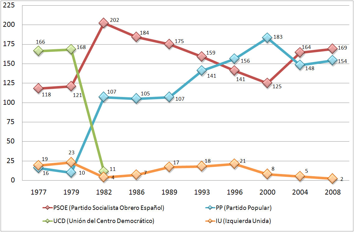 Gráfico del número de escaños de PSOE, PP, IU y UCD en el Congreso de los Diputados de España (1977-2008). Notas: El actual Partido Popular (PP) se presentó en las elecciones de 1977 como Alianza Popular, en las de 1979 como Coalición Democrática, en las de 1982 como Alianza Popular - Partido Demócrata Popular y en las de 1986 como Coalición Popular. En las elecciones de 1977, 1979 y 1982 se cuenta para la gráfica como Izquierda Unida (IU) al Partido Comunista de España, que sería el núcleo de la futura coalición. La Unión del Centro Democrático (UCD) se presentó en las elecciones de 1977, 1979 y 1982, y luego desapareció como partido político.